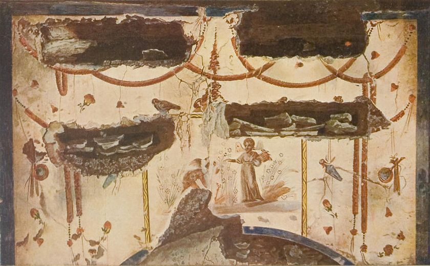 Catacombe di Domitilla (photo by Wilpert, Joseph. Die Malereien der Katakomben Roms, 1903)